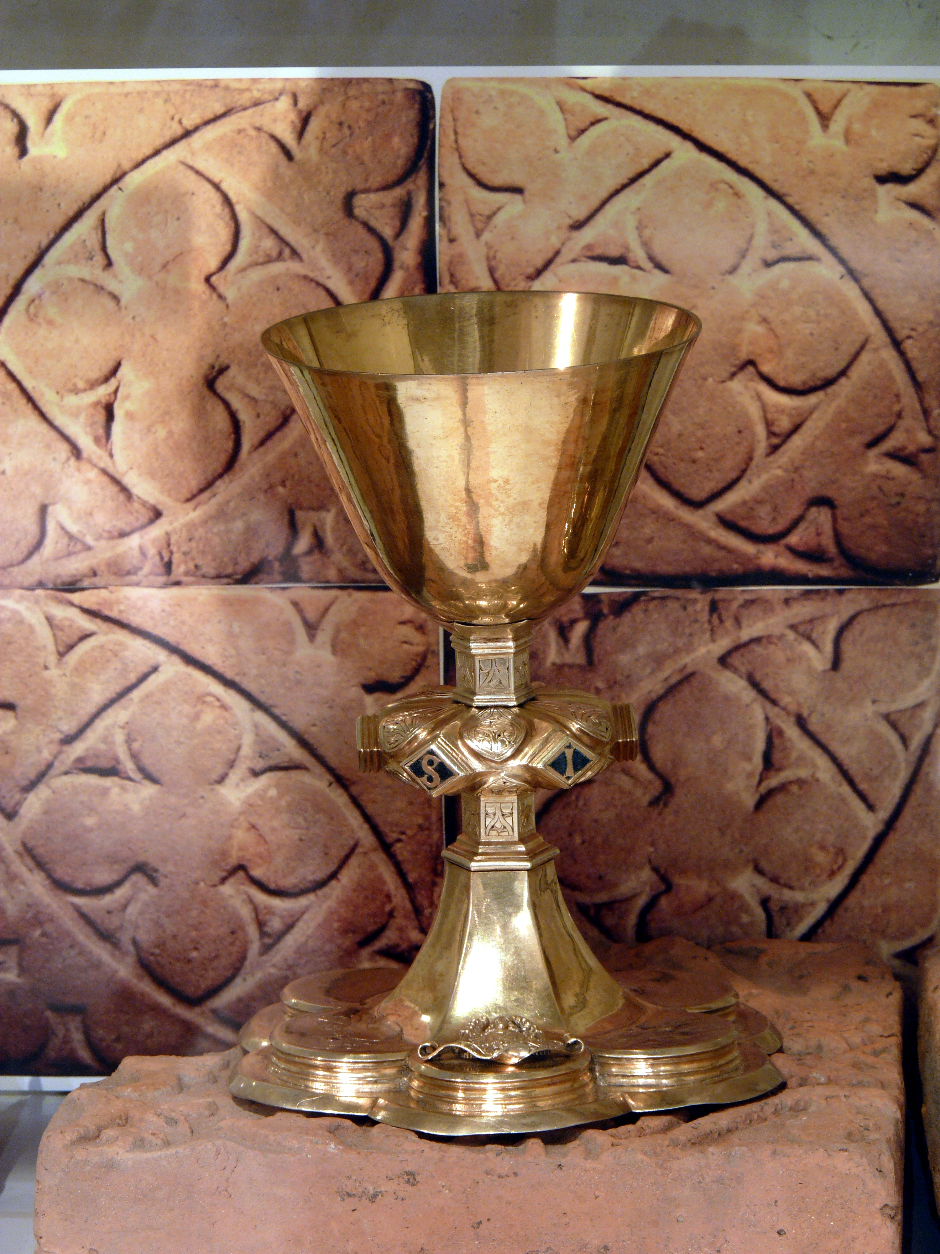 Ausstellung im Rahmen der 1000-Jahr-Feier der ehemaligen Klosterkirche in Reinhausen, Gemeinde Gleichen, Südniedersachen: Abendmahlskelch aus der Kirche . Datiert auf die Zeit zwischen 1627 und 1661. Silber, vergoldet. Der Kelch steht auf einer gotischen Maßwerk-Bodenfliese, die ebenfalls aus Reinhausen stammt, im Hintergrund eine Fotografie mit mehreren dieser Fliesen.